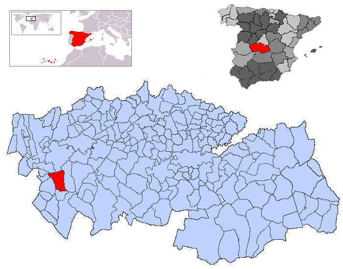 Aldeanueva de Barbarroya en la provincia de Toledo